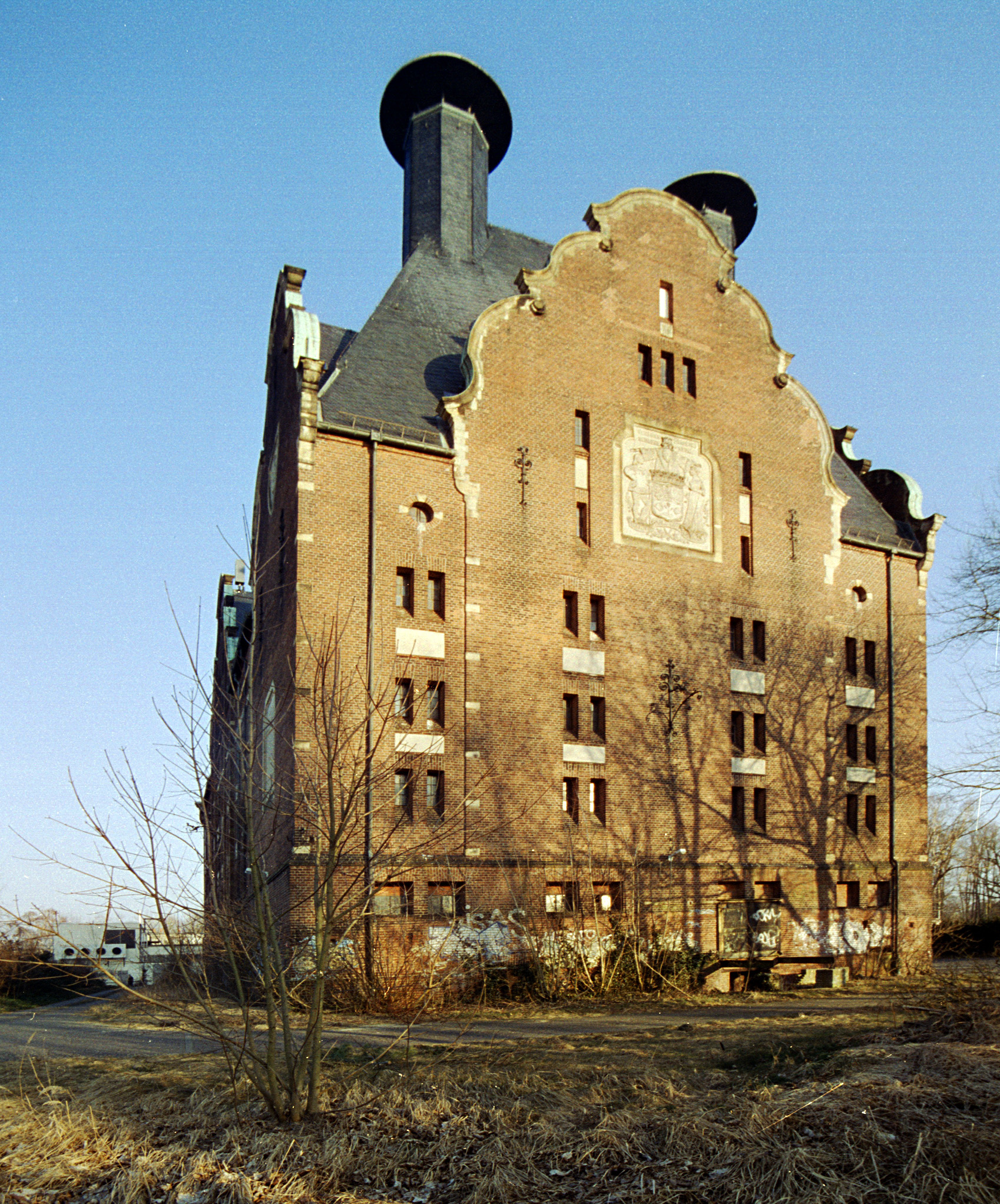 Mälzerei Lichtenrade im März 2018